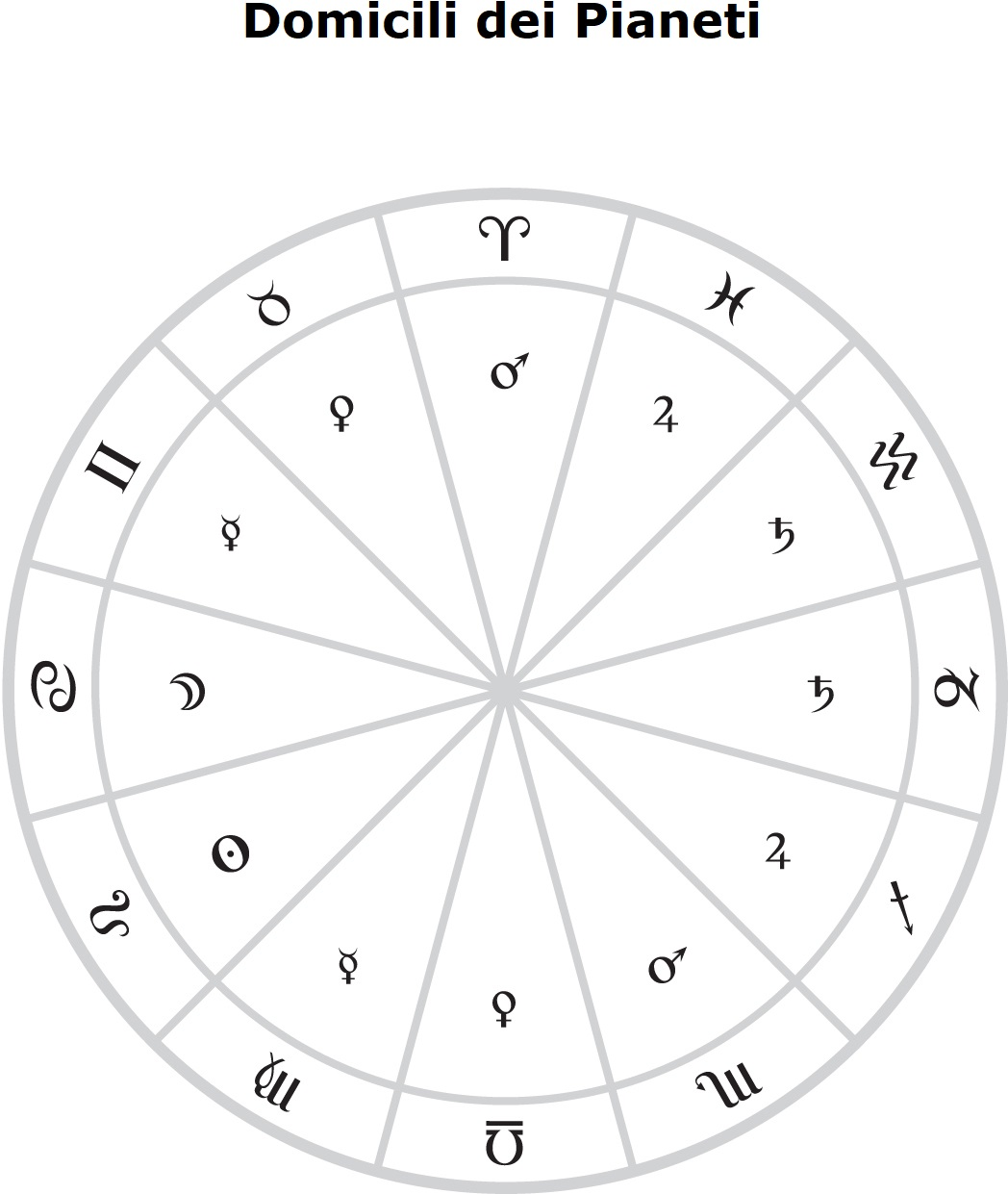 Domicili dei Pianeti secondo l'astrologia occidentale